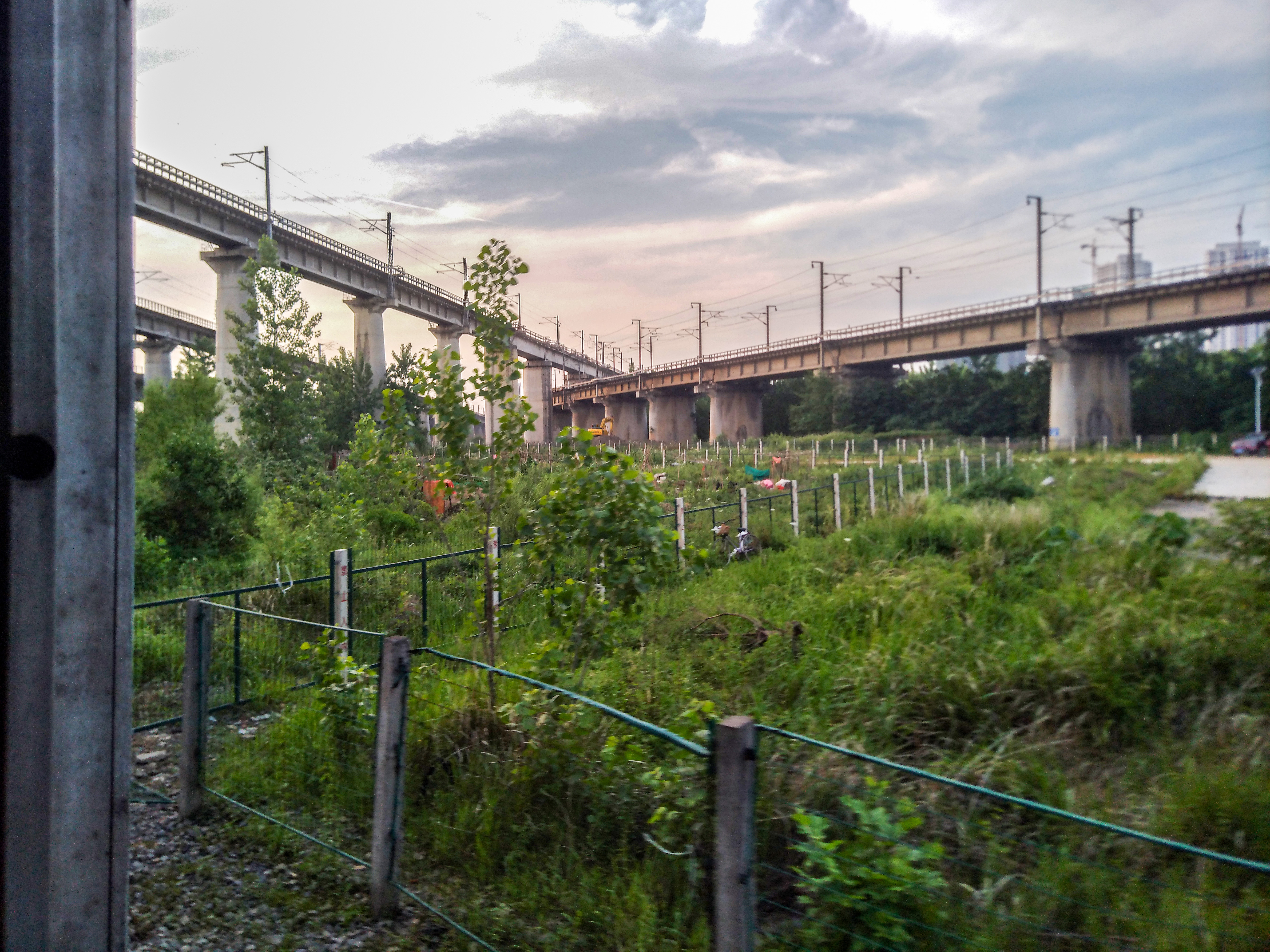 武九铁路楠栂庙站西侧，京广高速铁路上下行、滠武铁路、武汉站货车外绕线依次跨过武九铁路